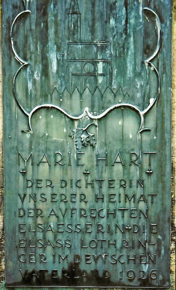 Photo de la stèle de la pierre tombale de Marie Hart dans le cimetière de Bad Liebenzell, Allemagne.